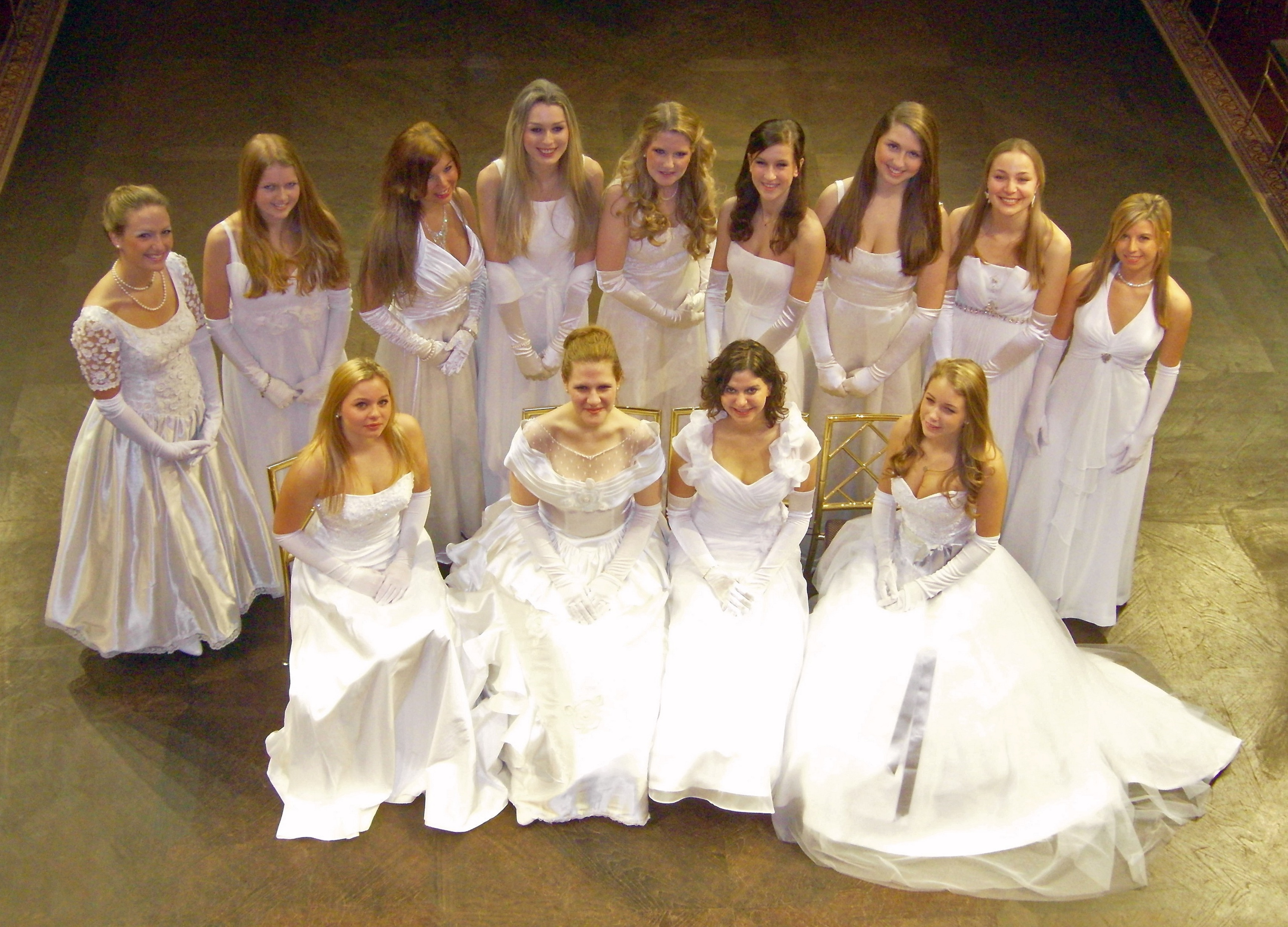 Debütantinnen beim Chrysanthemenball in München